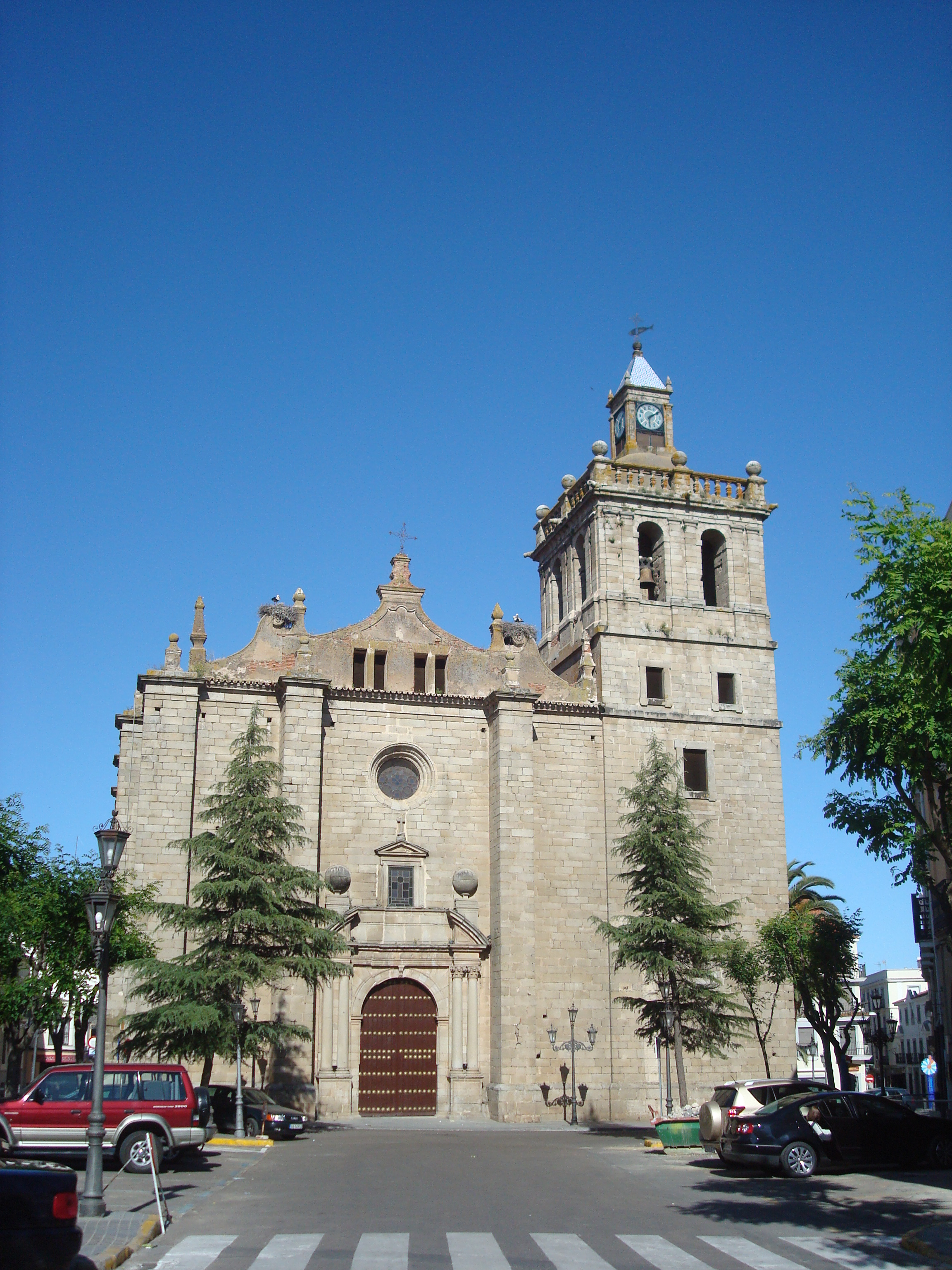 Villanueva de la Serena - 005